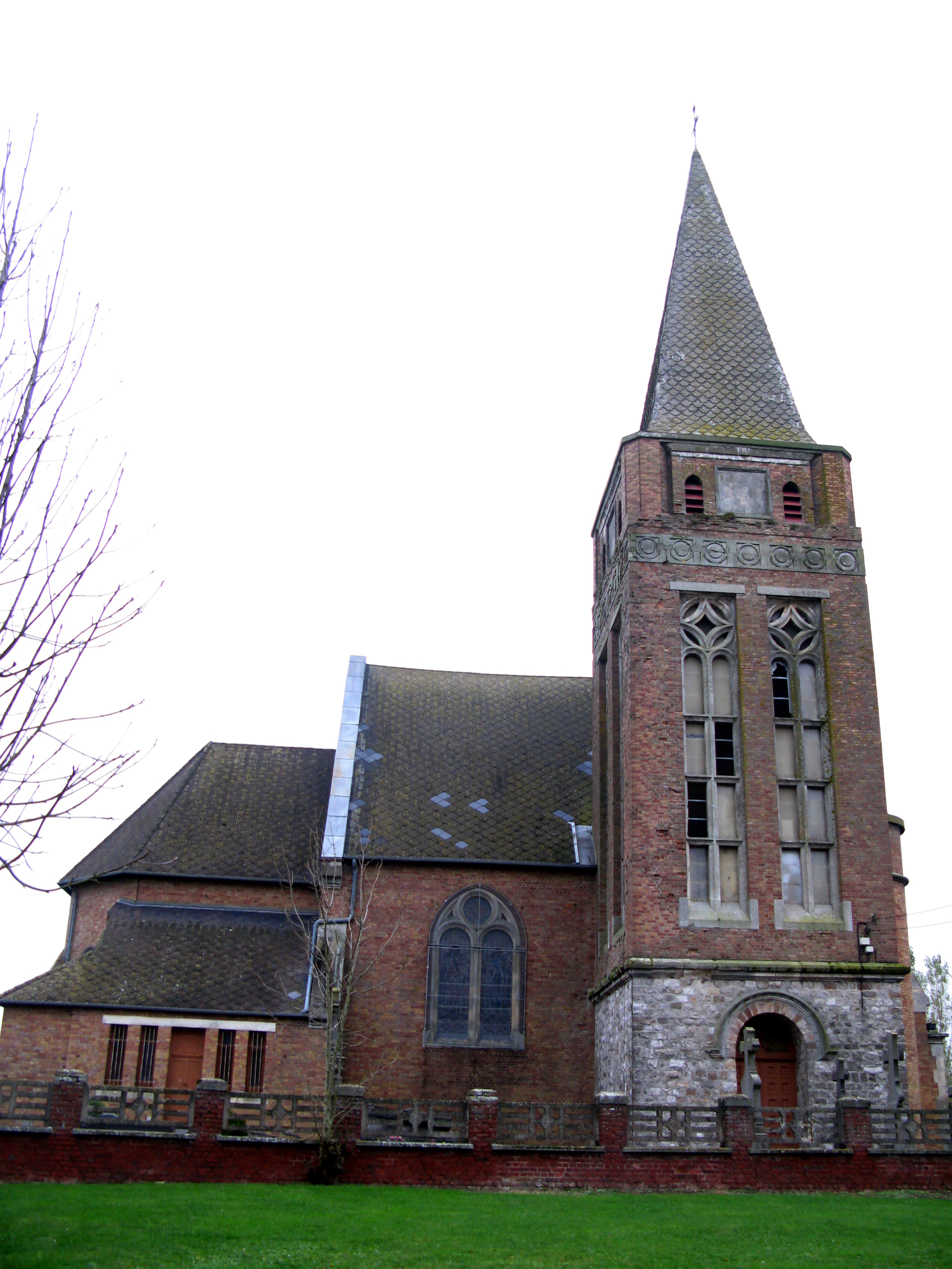 Bus (Pas-de-Calais, France) - L'église. .